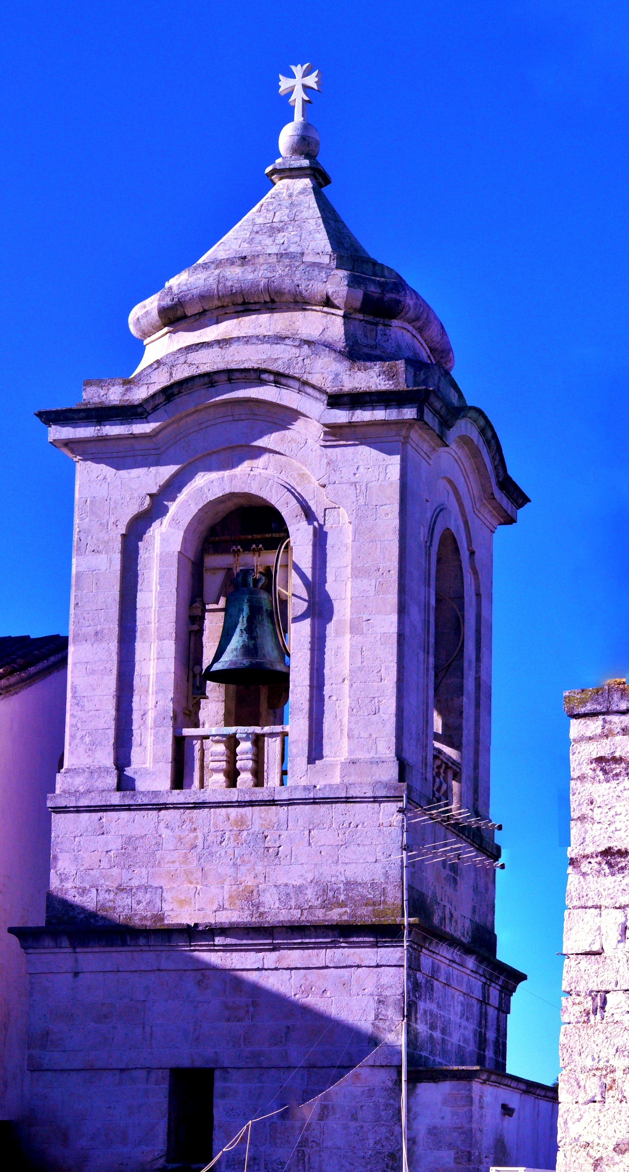 Campanile settecentesco della Collegiata di Ceglie Messapica